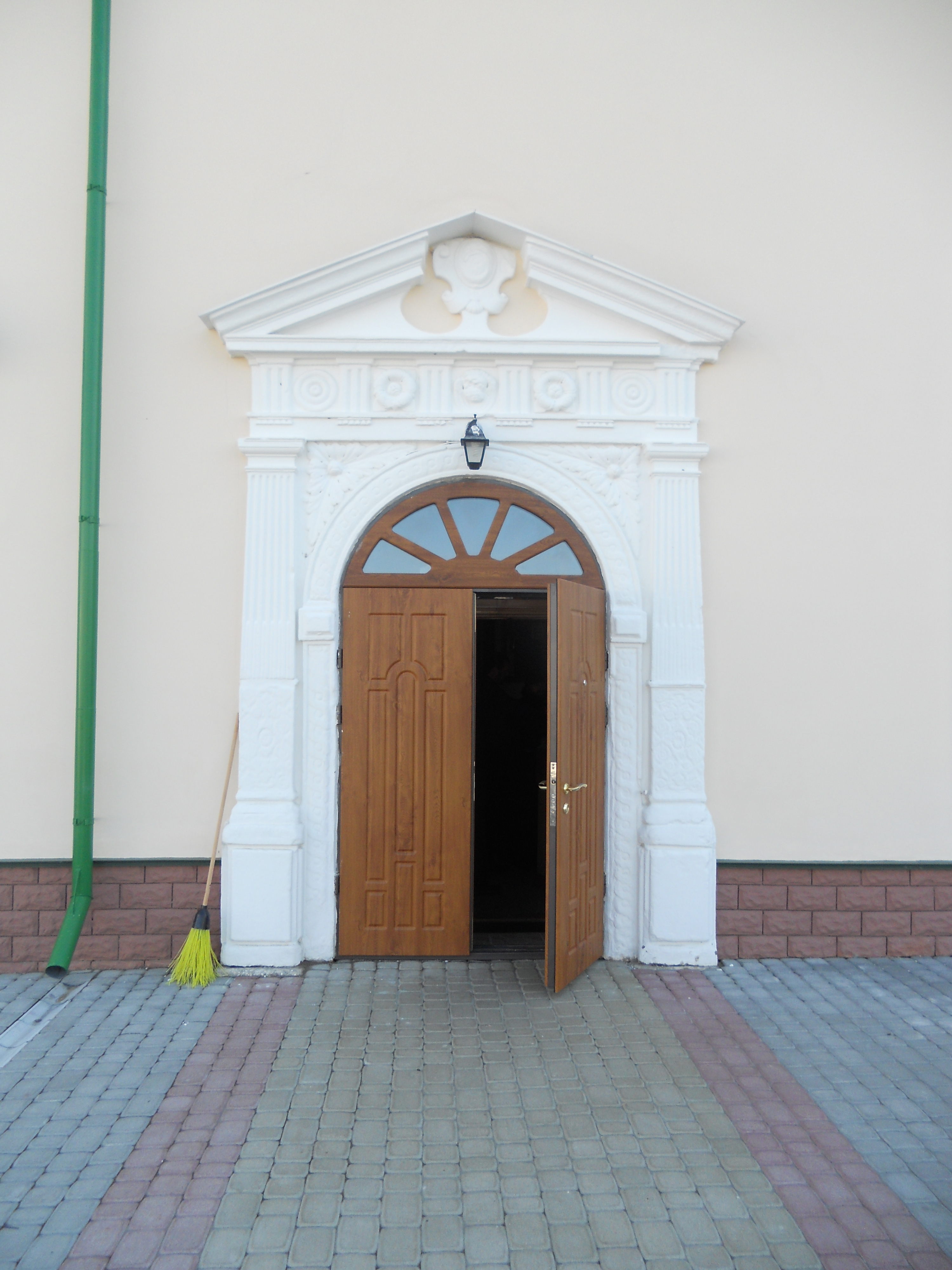 Межиріцький монастир. Вхідний портал північного корпусу келій.